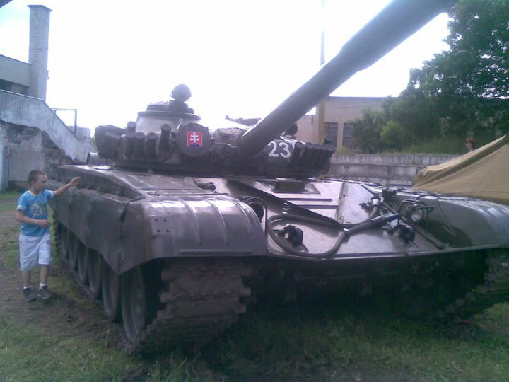 T-72M1 v Čadci